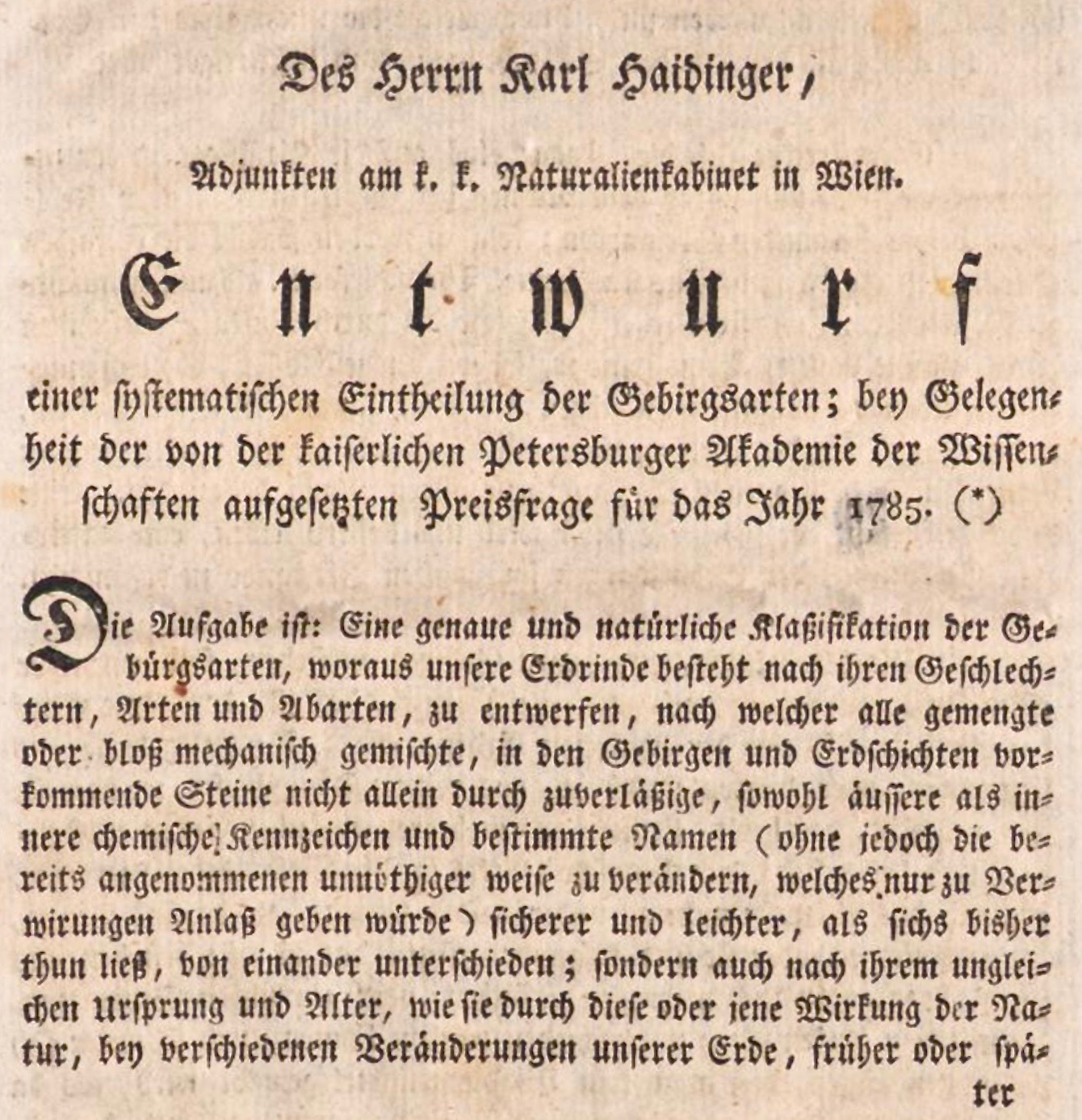 Anfang von: "Des Herrn Karl Haidinger, Adjunkten am k. k. Naturalienkabinet in Wien(,) Entwurf einer systematischen Eintheilung der Gebirgsarten; bey Gelegenheit der von der kaiserlichen Petersburger Akademie der Wissenschaften ausgesetzten Preisfrage für das Jahr 1785." In Ignaz Edler von Born (Hrsg.): '"Physikalische Arbeiten der einträchtigen Freunde in Wien,'" 2. Jahrgang, 1786, 2. Quartal, S. 23–104.